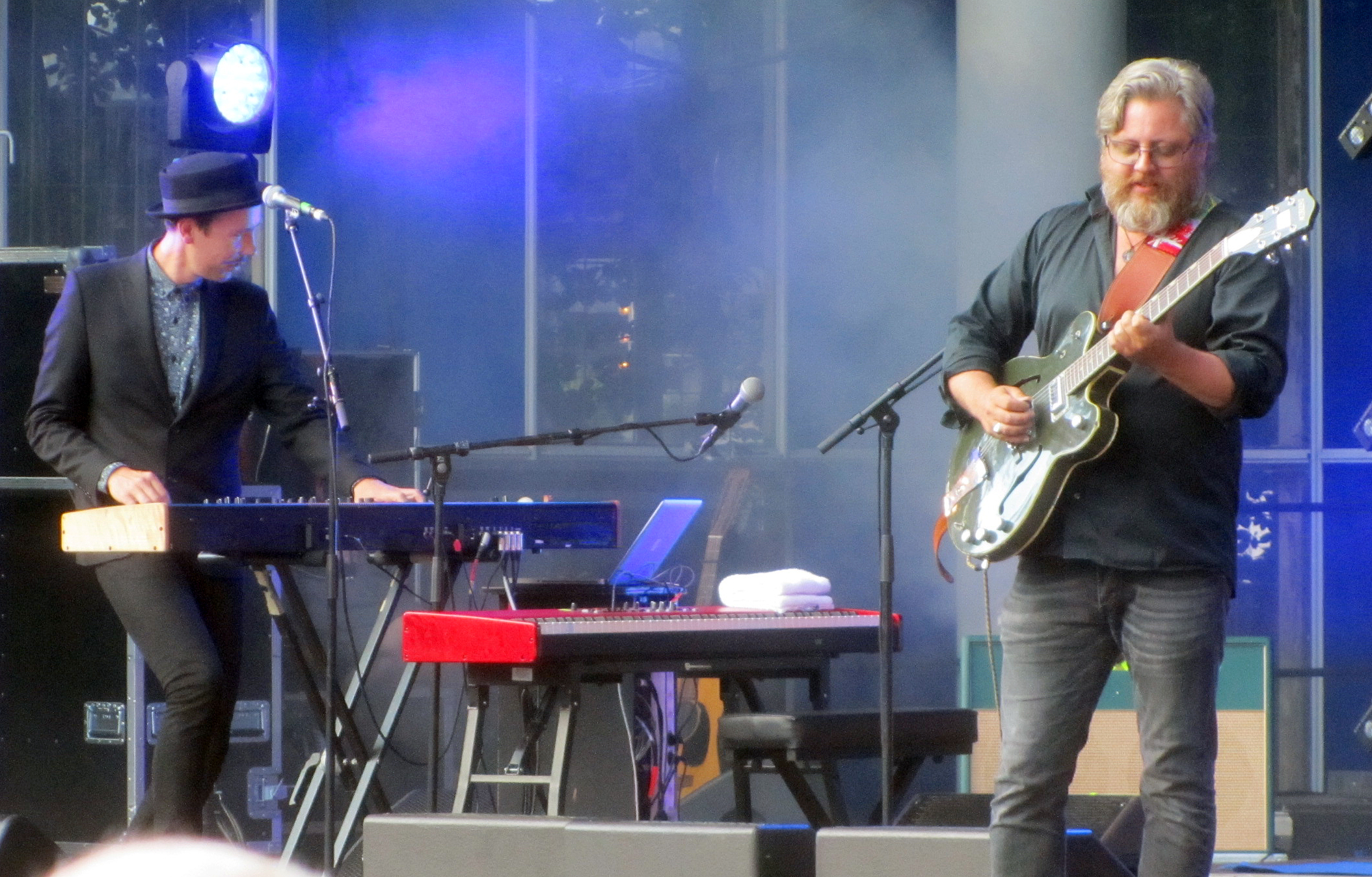 Søren Huss og Jess Jensen fra Sabyia i Tivoli Friheden, Aarhus